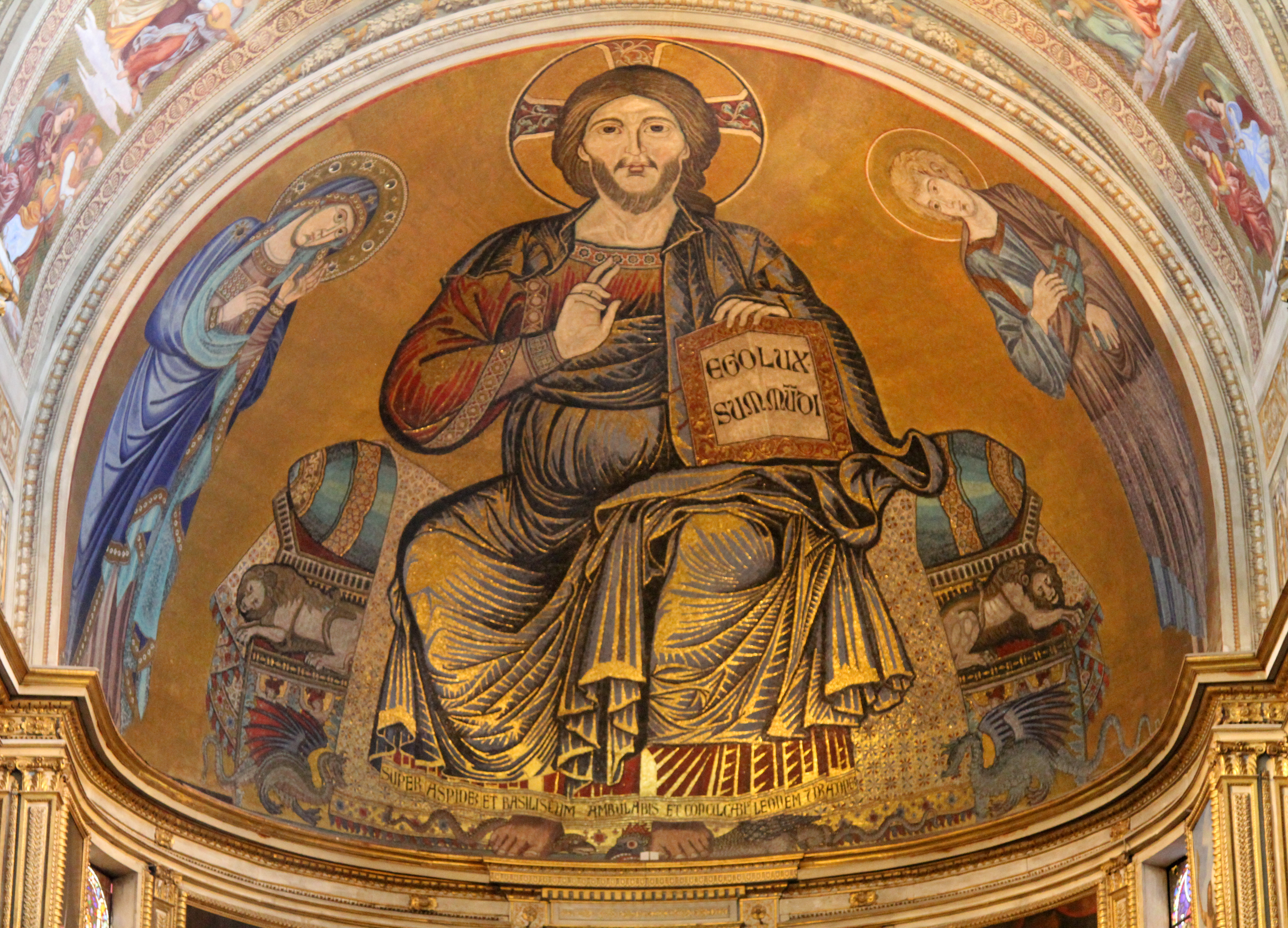 Duomo di Pisa: particolare dell'abside